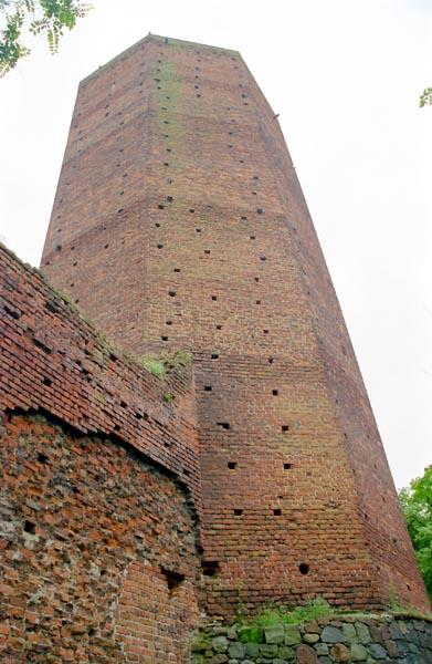 Kruszwica Castle (Poland)